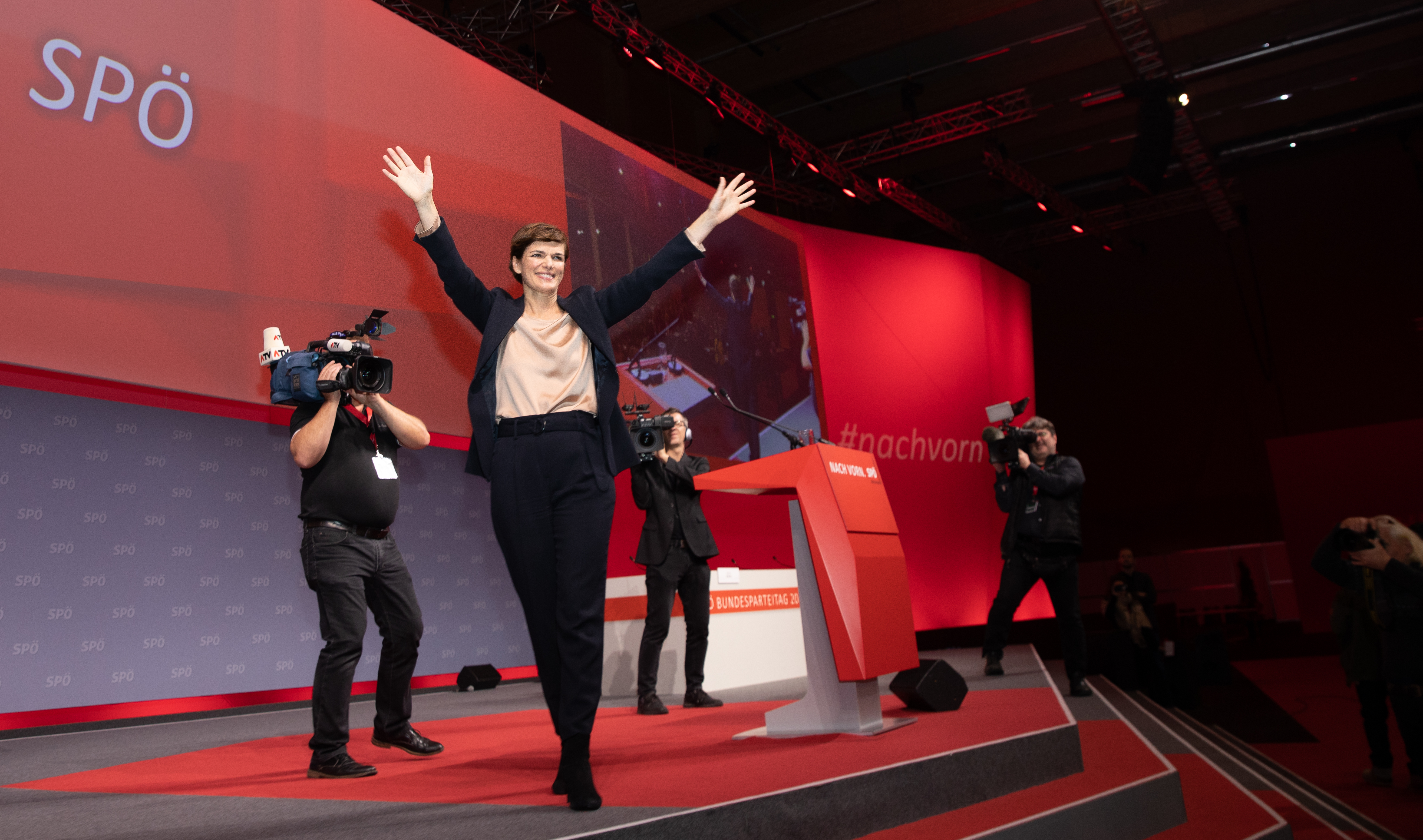 6977-by-Sebastian-Philipp